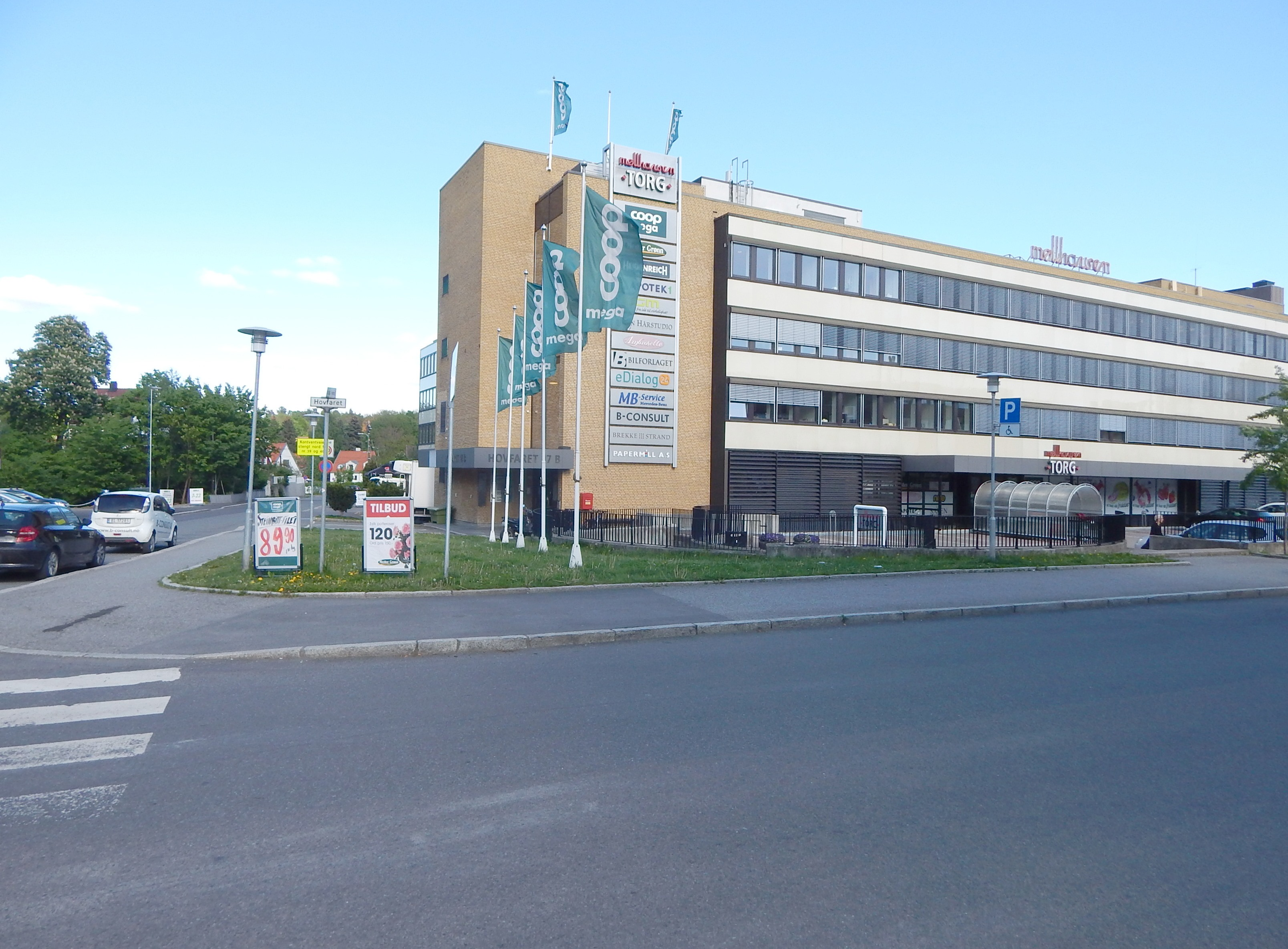 Hovfaret